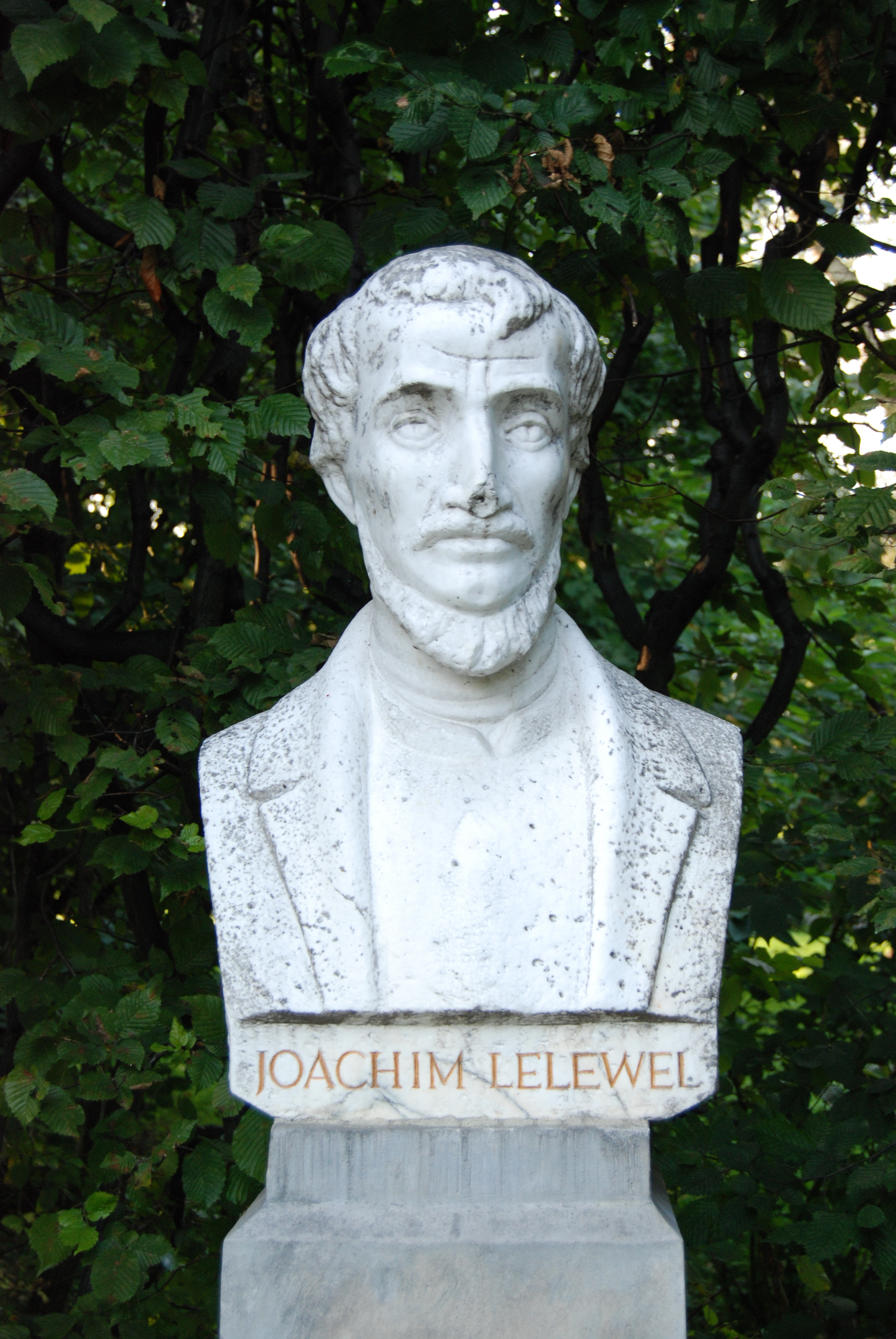 Pomnik Joachima Lelewela w Parku Jordana w Krakowie